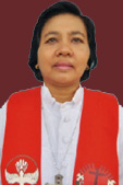 Pdt. Ni Luh Mariani, M. Min